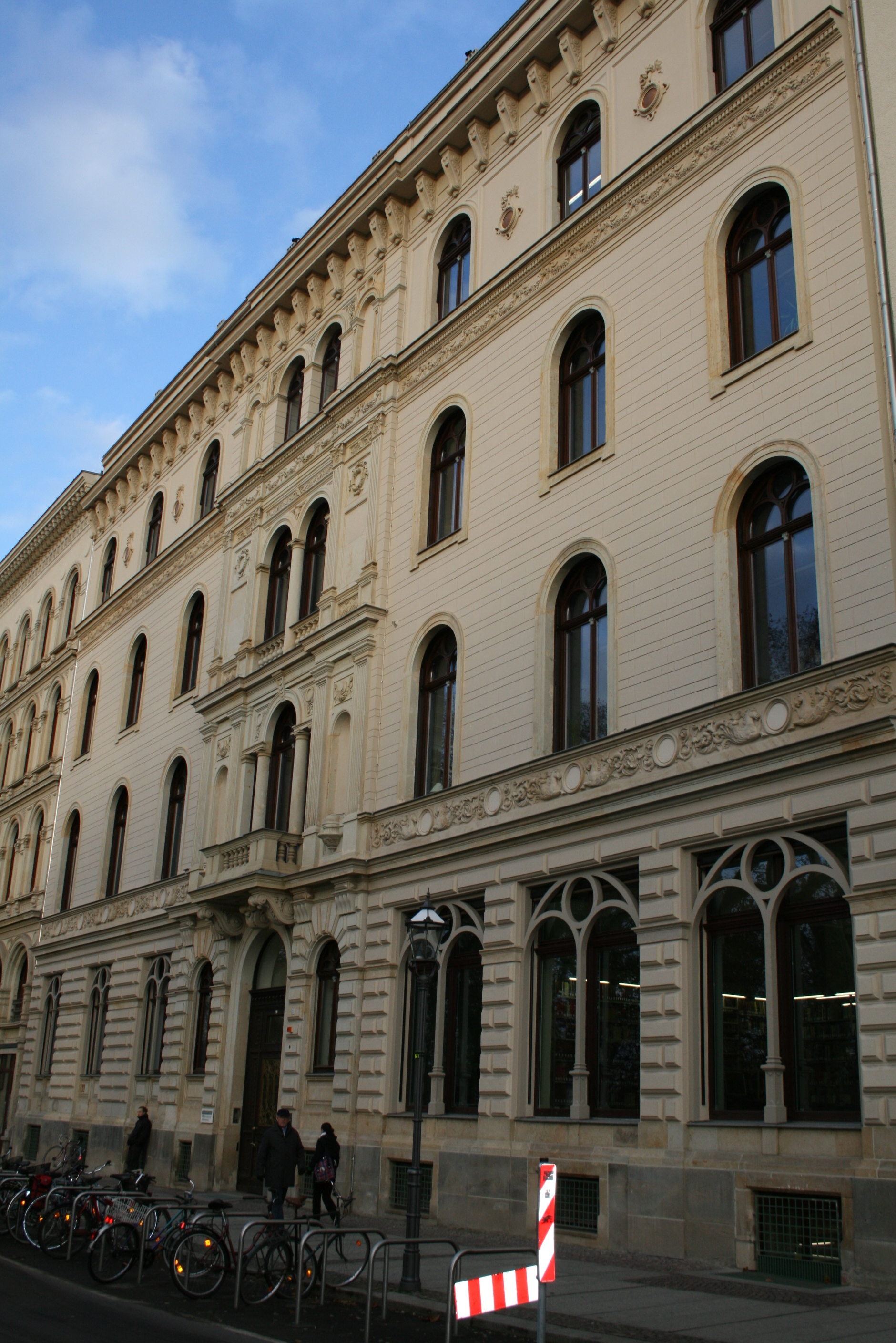 Religionswissenschaftliches Institut, Institut für Ethnolgie Uni Leipzig